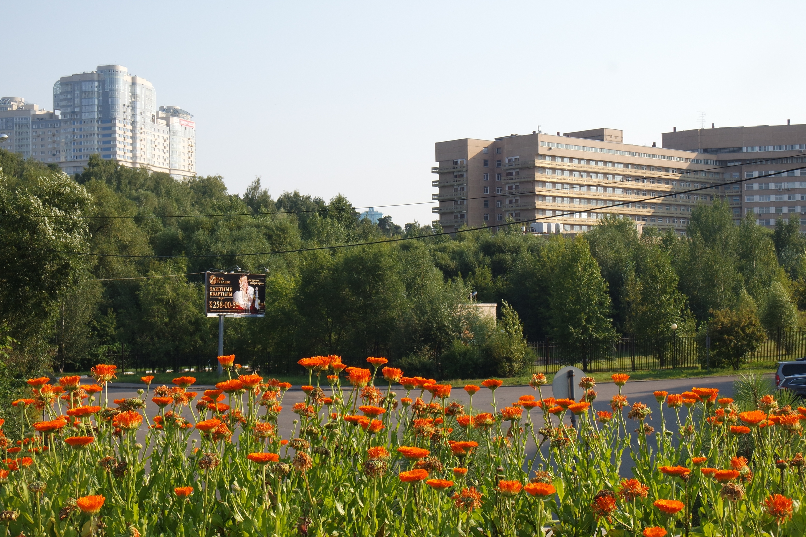 Северная оконечность Иваньковского шоссе. Здание слева — жилой комплекс «Зодиак», справа — корпус Центральной клинической больницы гражданской авиации